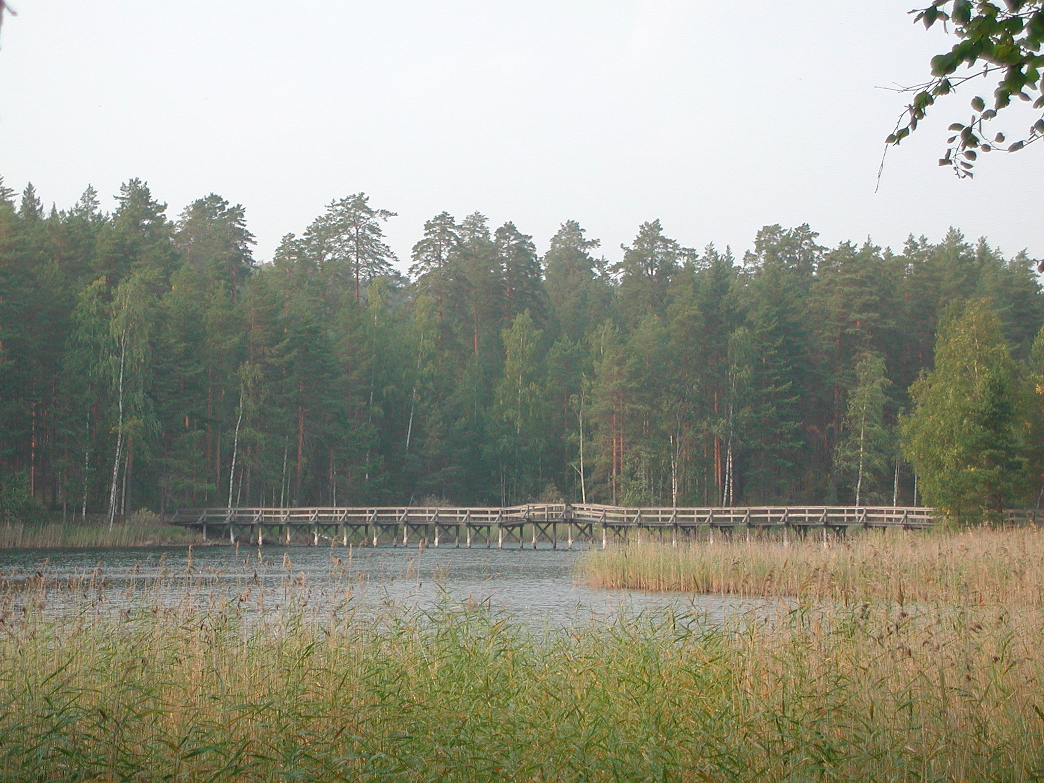 In den 1930er Jahren baute der finnische Tourismusverband Pususilta, auf Deutsch Kussbrücke, um die Verbindungen zwischen Finlandia und dem Valtionhotelli zu verkürzen. Der Name der Brücke stammt wahrscheinlich von romantischen Zuneigungen, inspiriert von einer wunderschönen natürlichen Umgebung. Die Brücke wurde 1983 wieder aufgebaut. Dateiname : DSCN7234.JPG Dateigröße : 703.5 KB (720397 Byte) Aufnahmedatum : 2002/09/06 00:00:00 Bildgröße : 2048 x 1536 Pixel Auflösung : 300 x 300 dpi Farbtiefe : 8 Bit/Kanal Schützen : Aus Ausblenden : Aus Kamera-ID : N/A Kamera : E880 Qualitätsmodus : NORMAL Messmethode : Mehrfeld Belichtungsbetriebsart : Programmautomatik Speedlight : Nein Brennweite : 20 mm Verschlusszeit : 1/124.9 Sekunde Blende : F4.2 Belichtungskorrektur : +0.3 EV Fester Weißabgleich : Automatik Objektiv : Integriert Blitz-Synchronisierungsmodus : N/A Belichtungsdifferenz : N/A Flexibles Programm : N/A Empfindlichkeit : Auto Schärfung : Automatik Farbmodus : Farbe Farbeinstellungen : N/A Farbsättigung : N/A Farbsättigung : N/A Tonwertkorrektur : Normal Breite (GPS) : N/A Länge (GPS) : N/A Höhe (GPS) : N/A